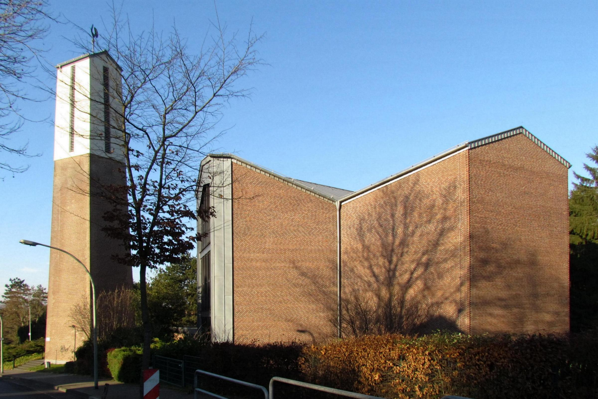 Kirchen und Kapellen in Übach-Palenberg